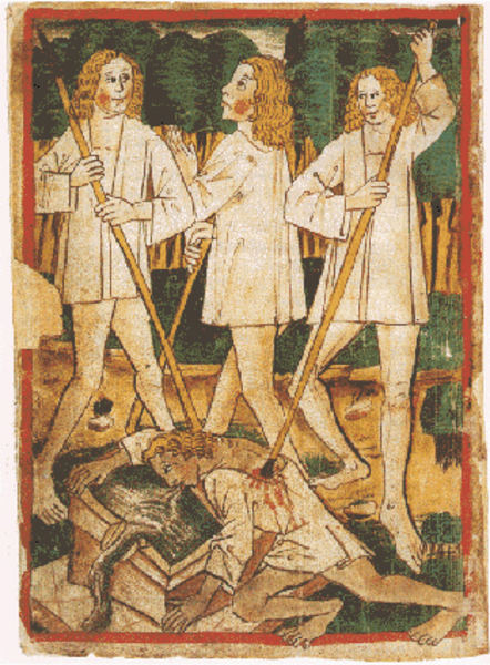 Nibelungenlied Manuscript K, (1480-1490)